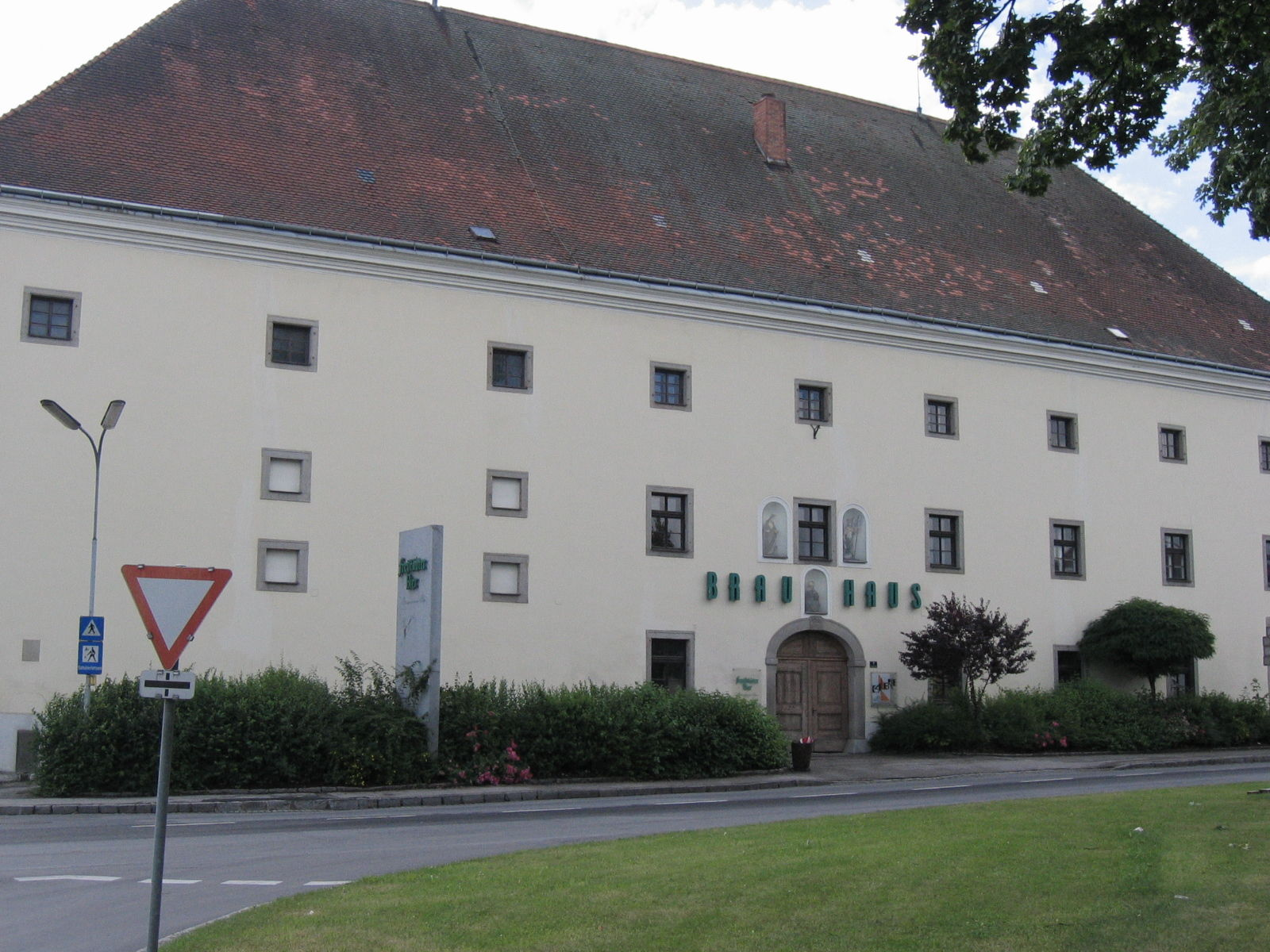 Brauhaus - erbaut 1770 - 1777